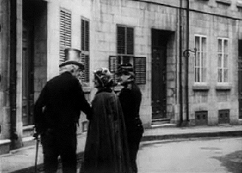 Image extraite du film The Old Guard (1912) de Vitagraph Co. of America